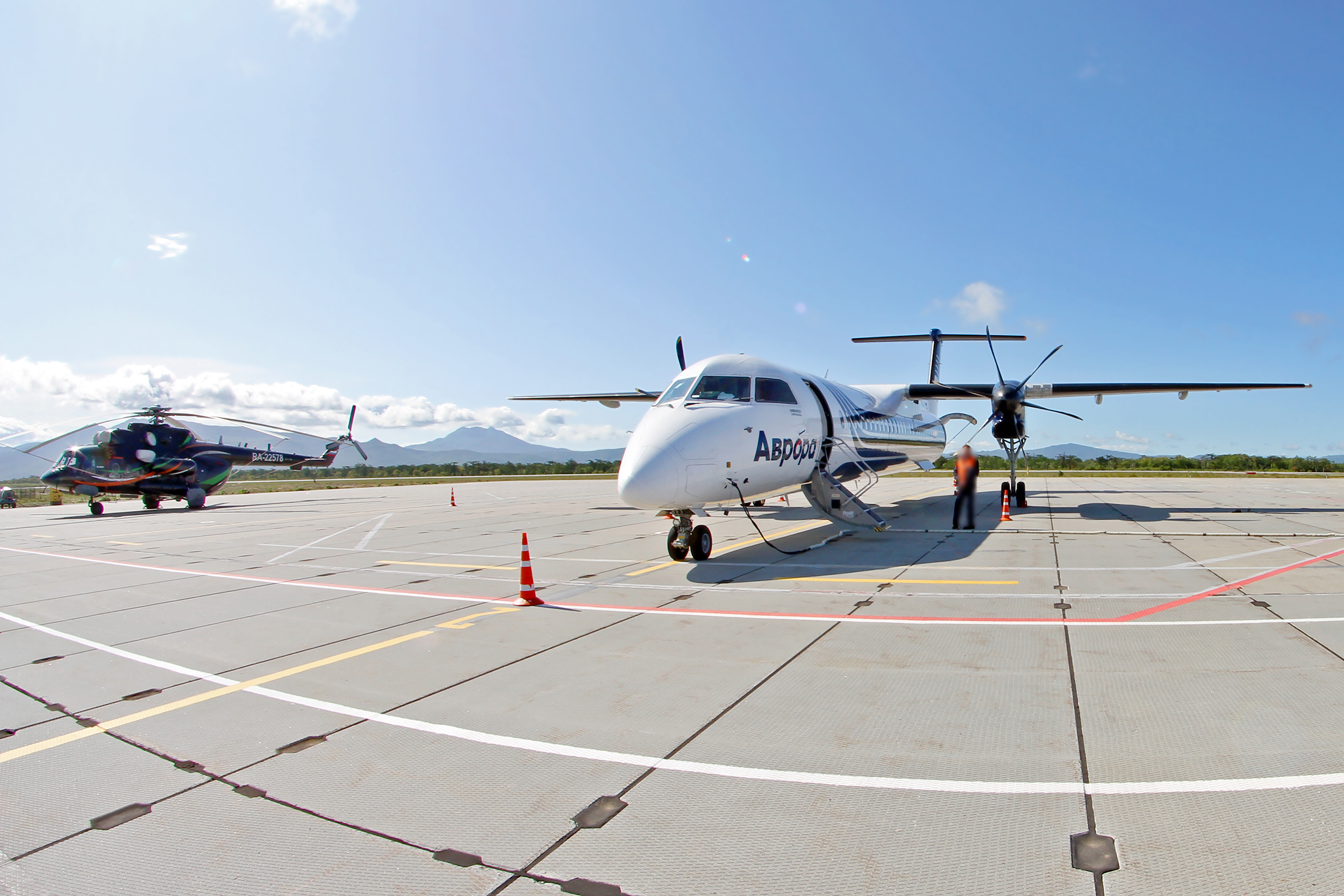 Вертолет Ми-8АМТ авиакомпании "Авиашельф" и самолет DHC-8-400 авиакомпании "Аврора" в аэропорту "Ясный" на о. Итуруп